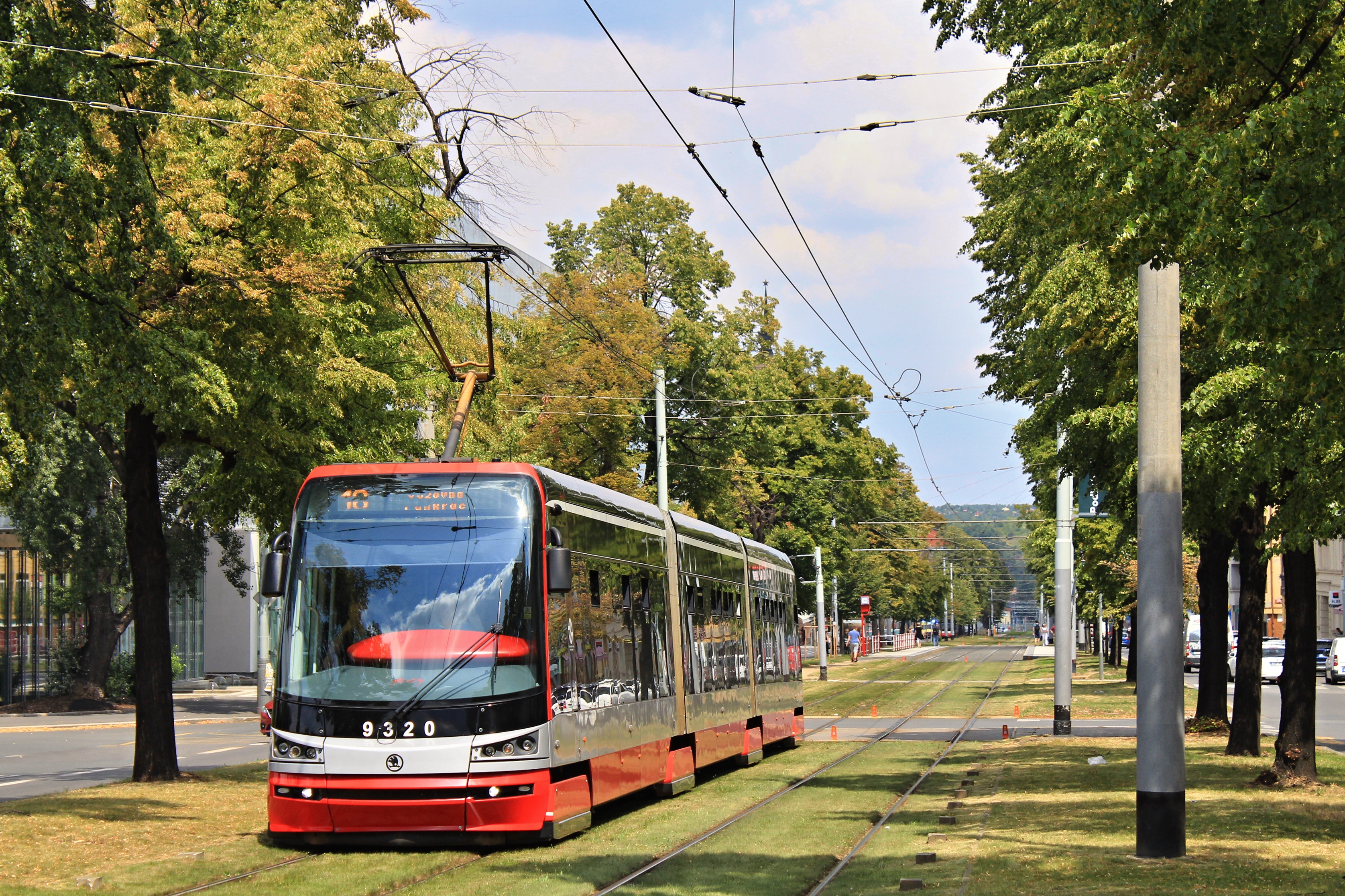 Škoda 15T 9320 na lince 18 u zastávky Lotyšská